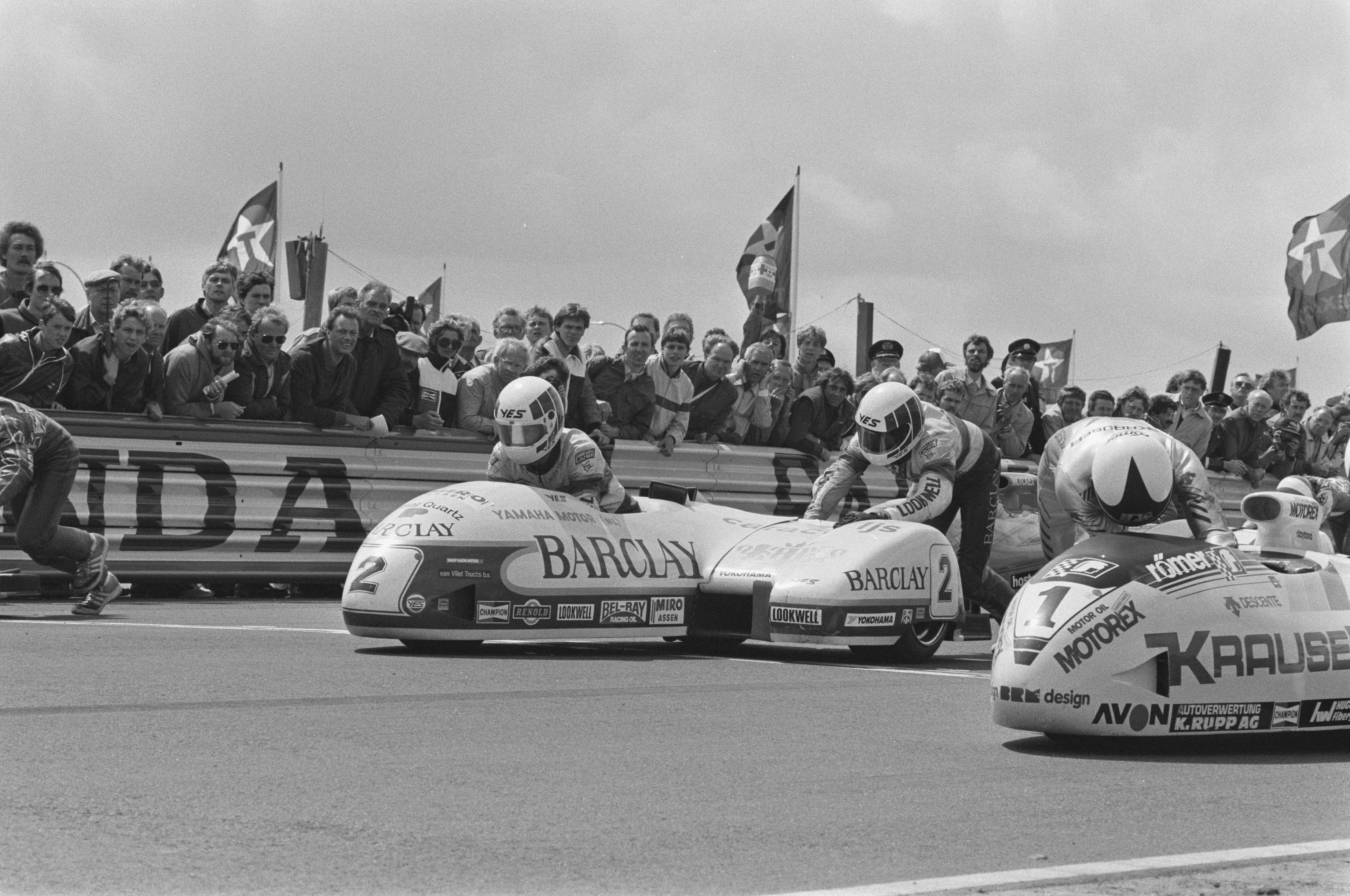 Collectie / Archief : Fotocollectie Anefo Reportage / Serie : TT Assen 1984 Beschrijving : TT van Assen, Zijspanrace. Links Egbert Streuer / Bernard Schnieders (nr. 2) en rechts Rolf Biland / Kurt Waltisperg (nr. 1) Datum : 30 juni 1984 Locatie : Assen Trefwoorden : motorcoureurs, motorfietsen, motorsport, races Persoonsnaam : Biland, Rolf, Schnieder, Egbert, Streuer, Egbert, Waltisperg, Kurt Fotograaf : Antonisse, Marcel / Anefo Auteursrechthebbende : Nationaal Archief Materiaalsoort : Negatief (zwart/wit) Nummer archiefinventaris : bekijk toegang 2.24.01.05 Bestanddeelnummer : 933-0190